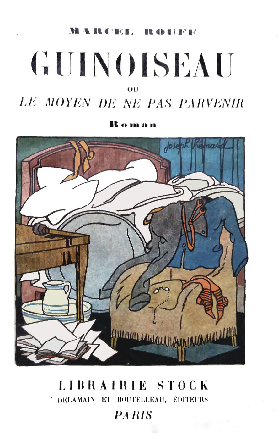 livre de M. Rouff Guinoiseau Paris 1926